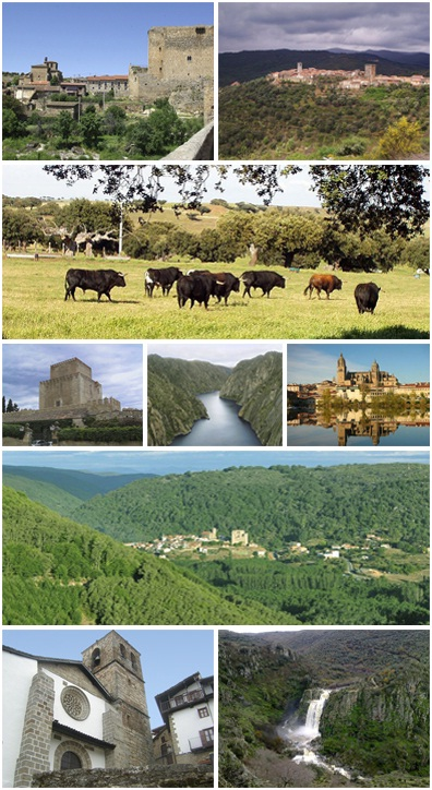 Composición con fotografías de diversos puntos de la provincia de Salamanca, en Castilla y León, España